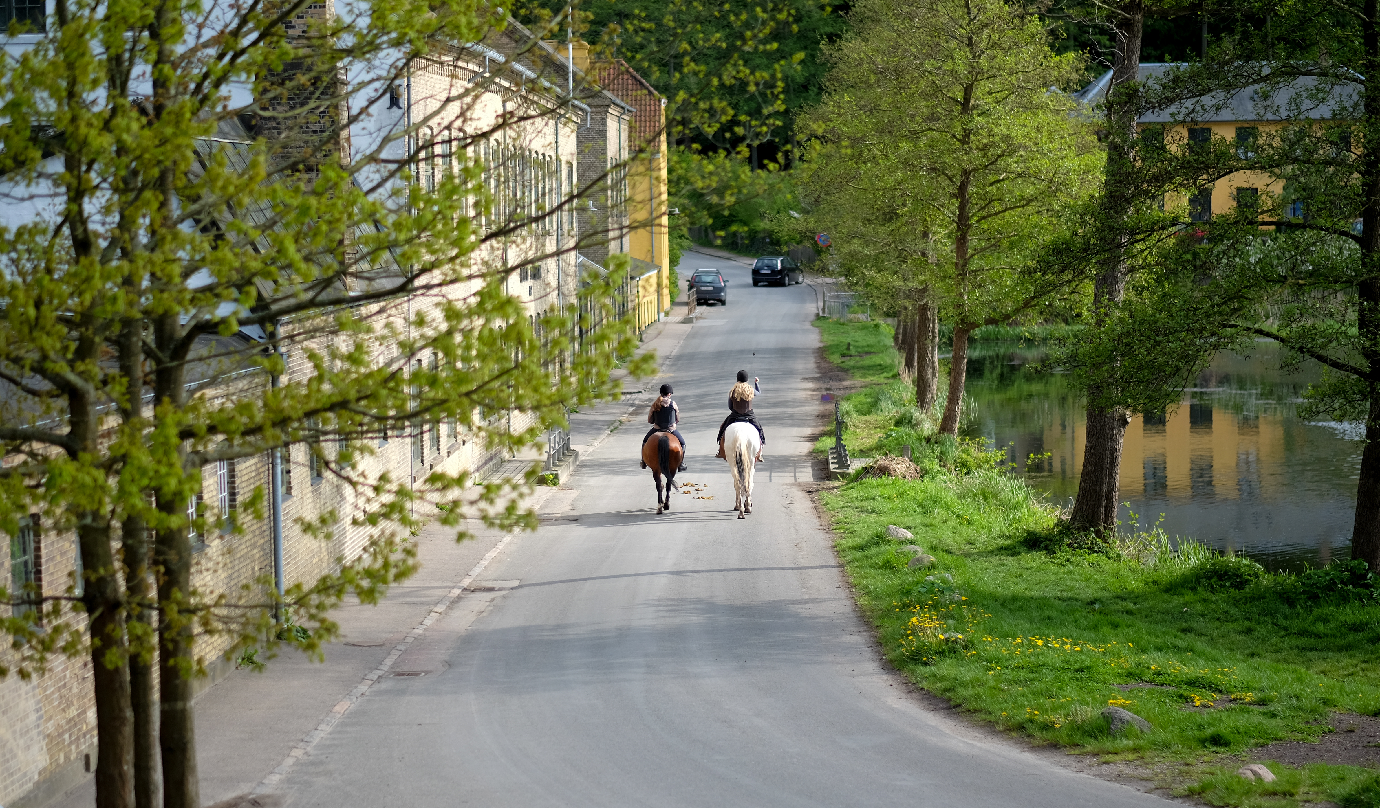 Horseback riding at Raadvad, Denmark